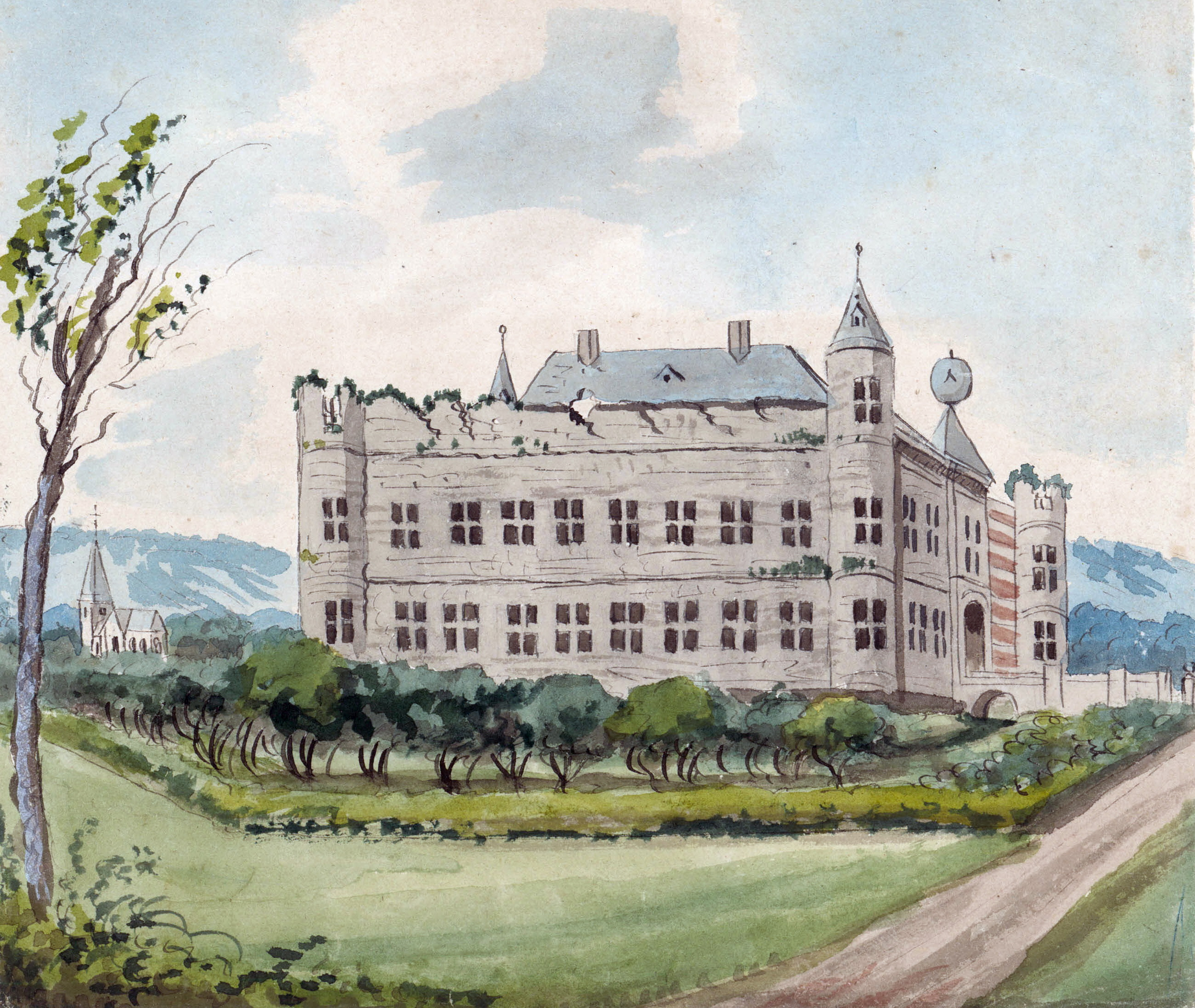 Ingekleurde tekening van Philippe van Gulpen van Kasteel Gronsveld bij Maastricht. De tekening geeft een reconstructie van de situatie in 1800 toen het kasteel al in ruïneuze staat verkeerde. Collectie Van der Noordaa in het RHCL, Maastricht, CVDN 295.